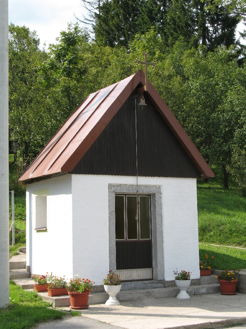 Kapelica svetog Roka u Šijama